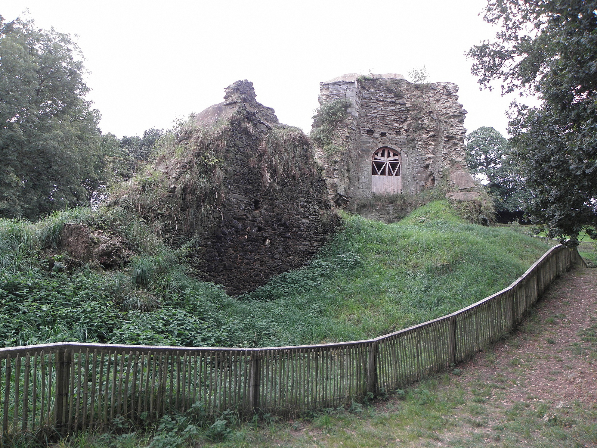 Ruines du donjon du château de Penhoat en Saint-Thégonnec (29). .